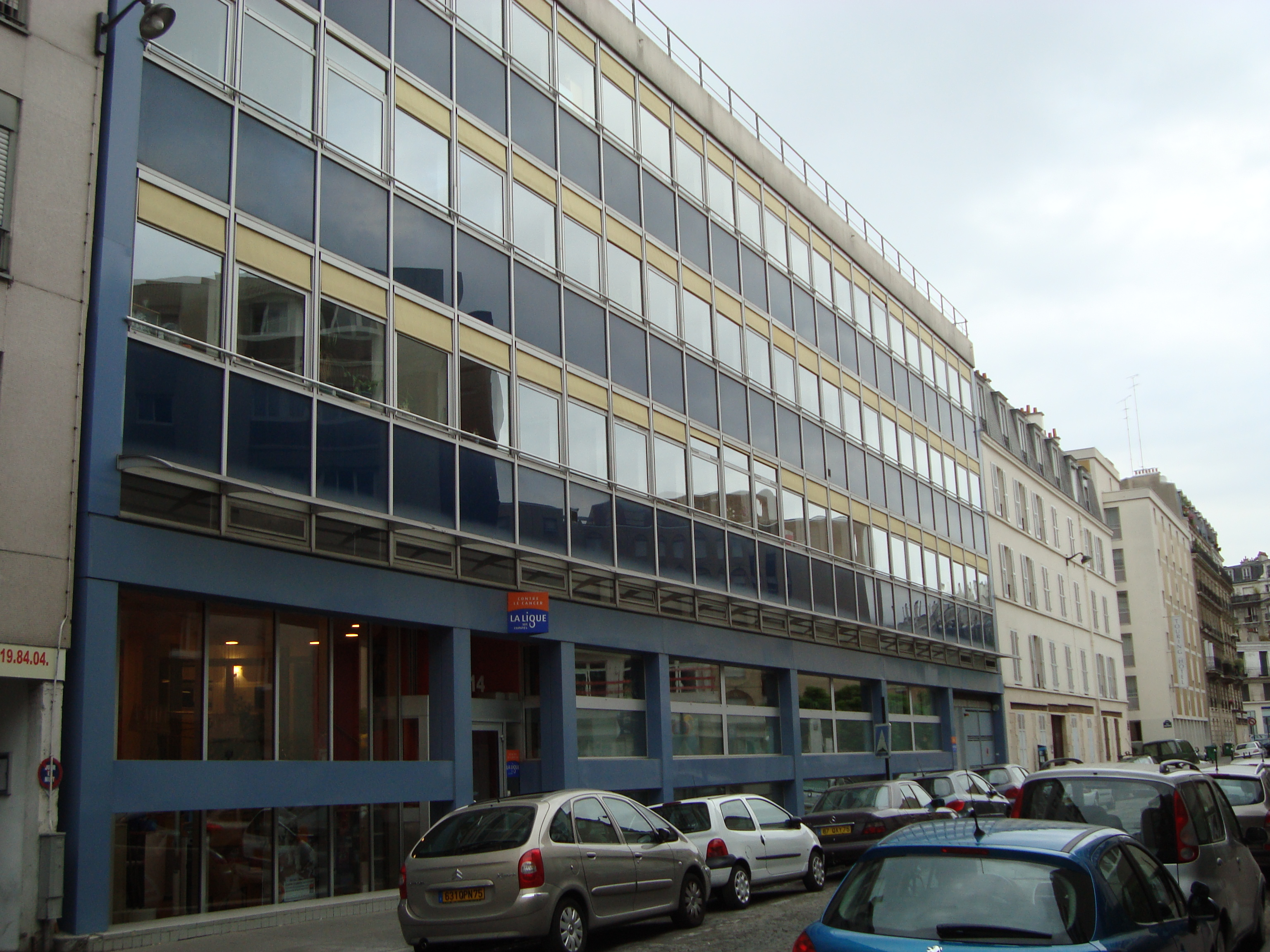 Batiments de la Ligue nationale contre le cancer au 14 de la rue Corvisart dans le 13e arrondissement de Paris